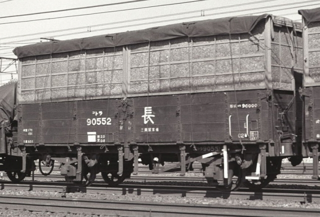 JNR Tora 90552（トラ90000形式チップ専用無蓋車、トラ90552、与野駅付近）1